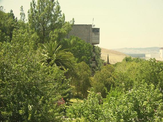 Los jardines y el Museo en la Avenida de la Feria